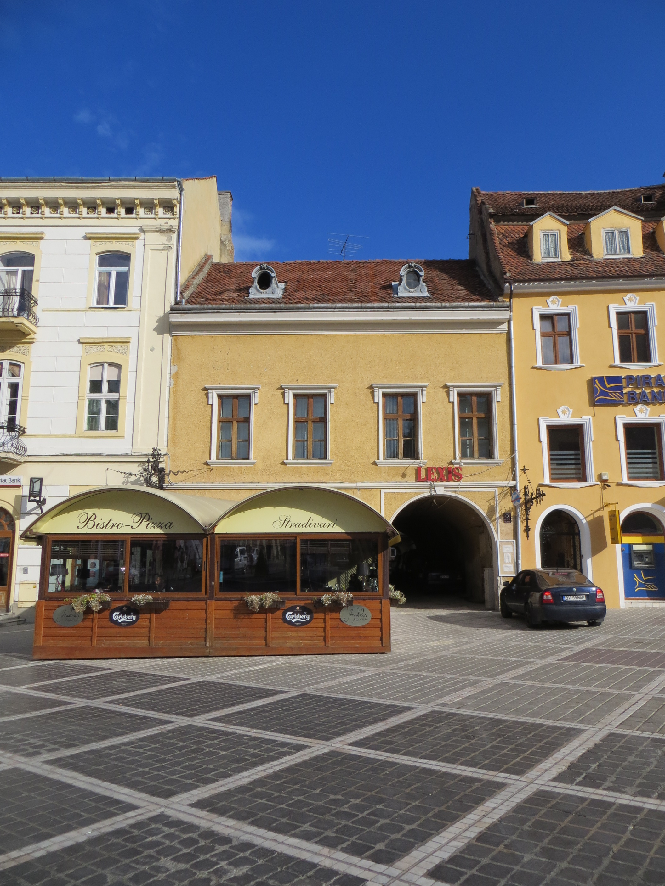 Casa Albrichsfeld-Kamner